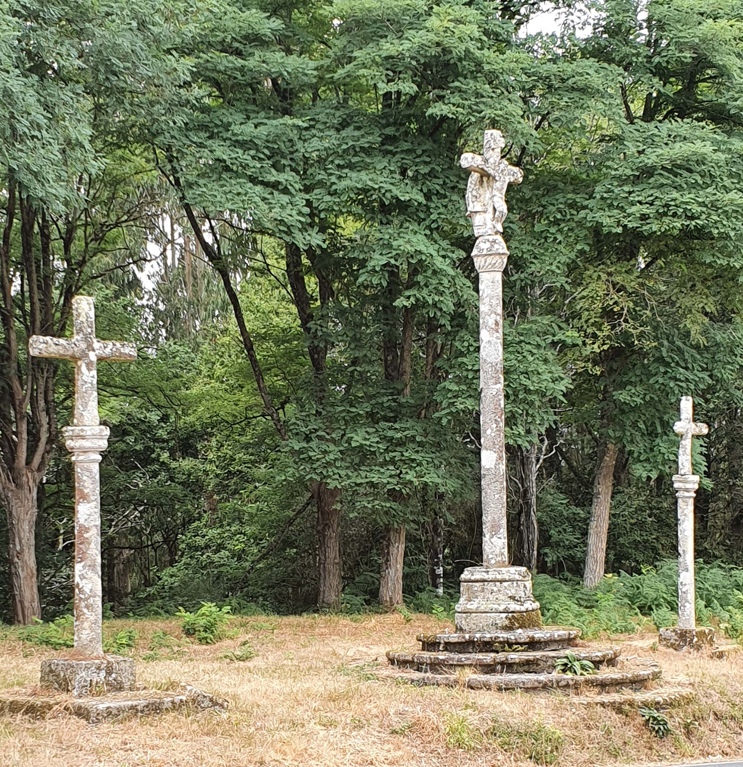 Coñécese co nome de O Coto á zona de Santa Mariña (Antas de Ulla) sobre a que se ubica o campo da festa, a Igrexa Parroquial e mailo viacrucis composto de varios cruceiros que a rodean. Toda a zona era un antigo castro